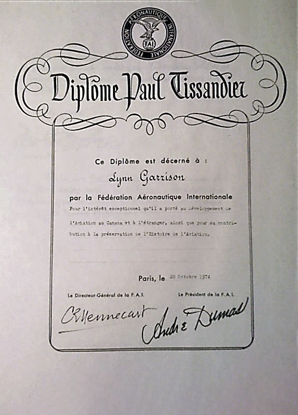 Diplome Paul Tissandier